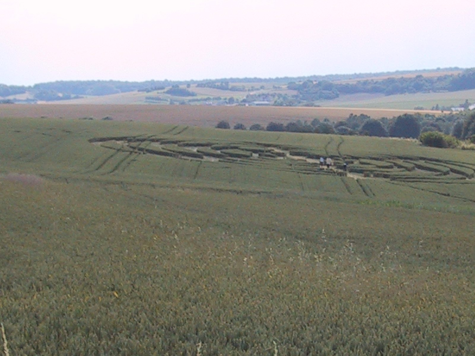 Ein Kornkreis aus Bedersdorf, leider aber eine Fälschung des Südwestrundfunks en: A crop circle (found in Bedersdorf) and a fake by Südwestrundfunk